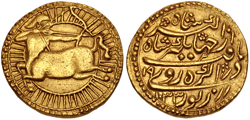 سکه جهانگیر شاه هند؛ خورشید در برج کمان